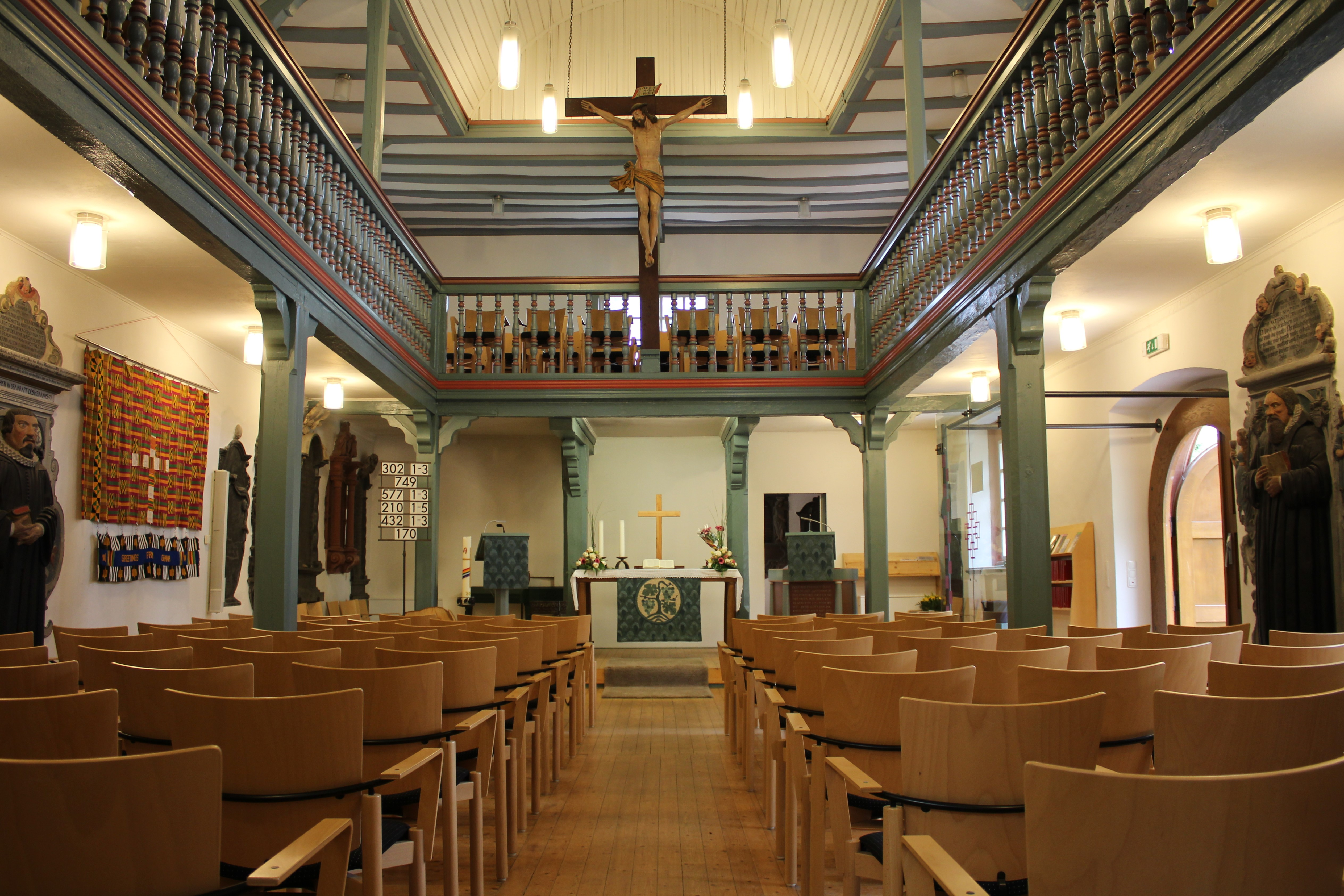 Kapelle Alter Friedhof, Gießen, Hessen, Deutschland